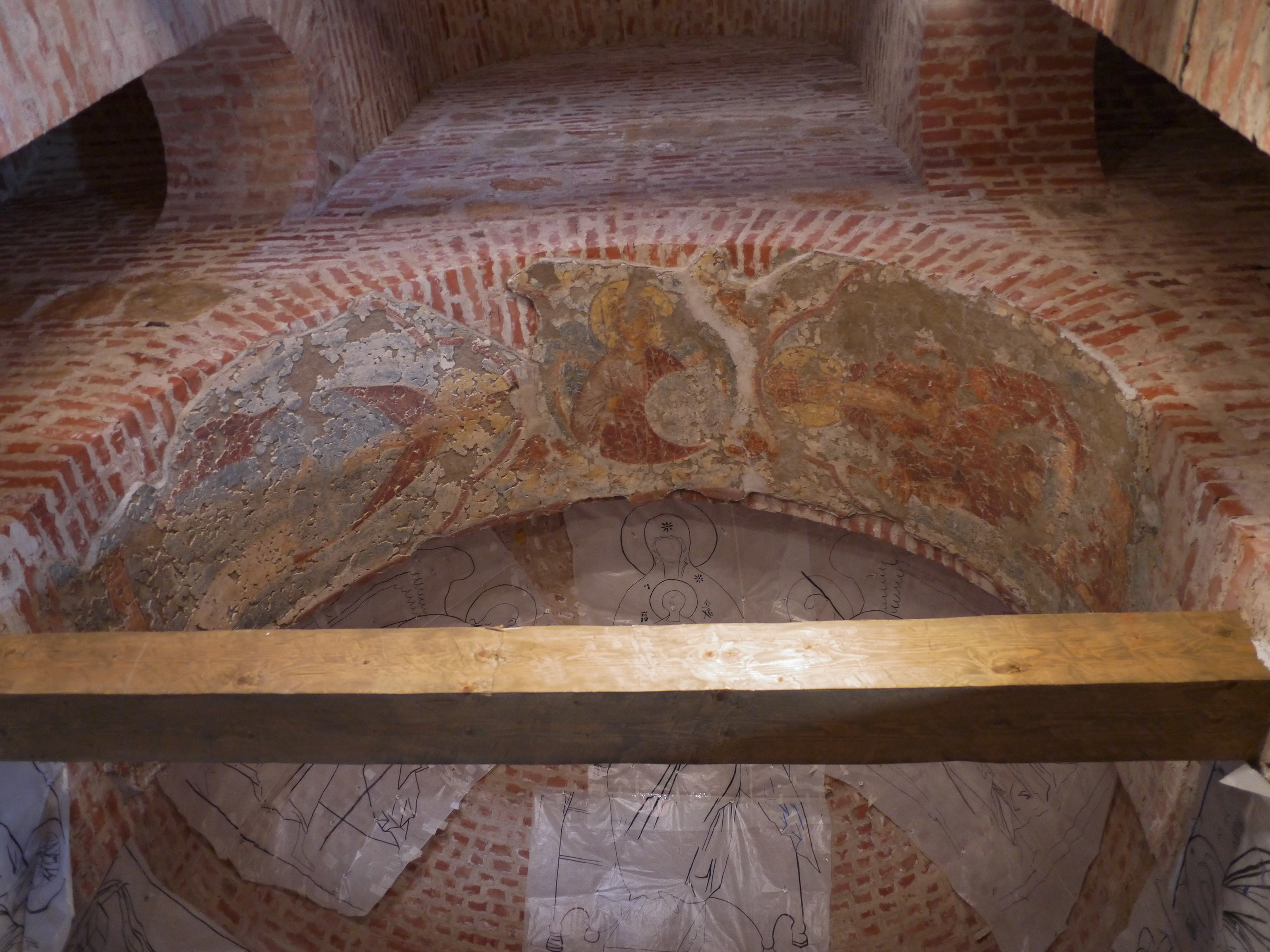 Церковь Успения Пресвятой Богородицы на Волотове (Новгородская область, Великий Новгород, деревня Волотово)